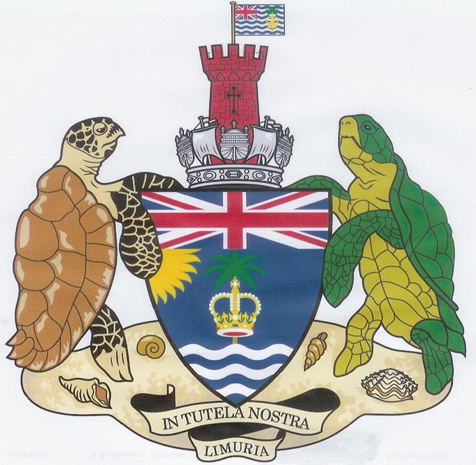 Armoiries B.I.O.T.